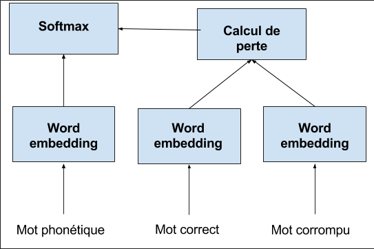 Entrainement du word embedding pour l'analyse de sentiments